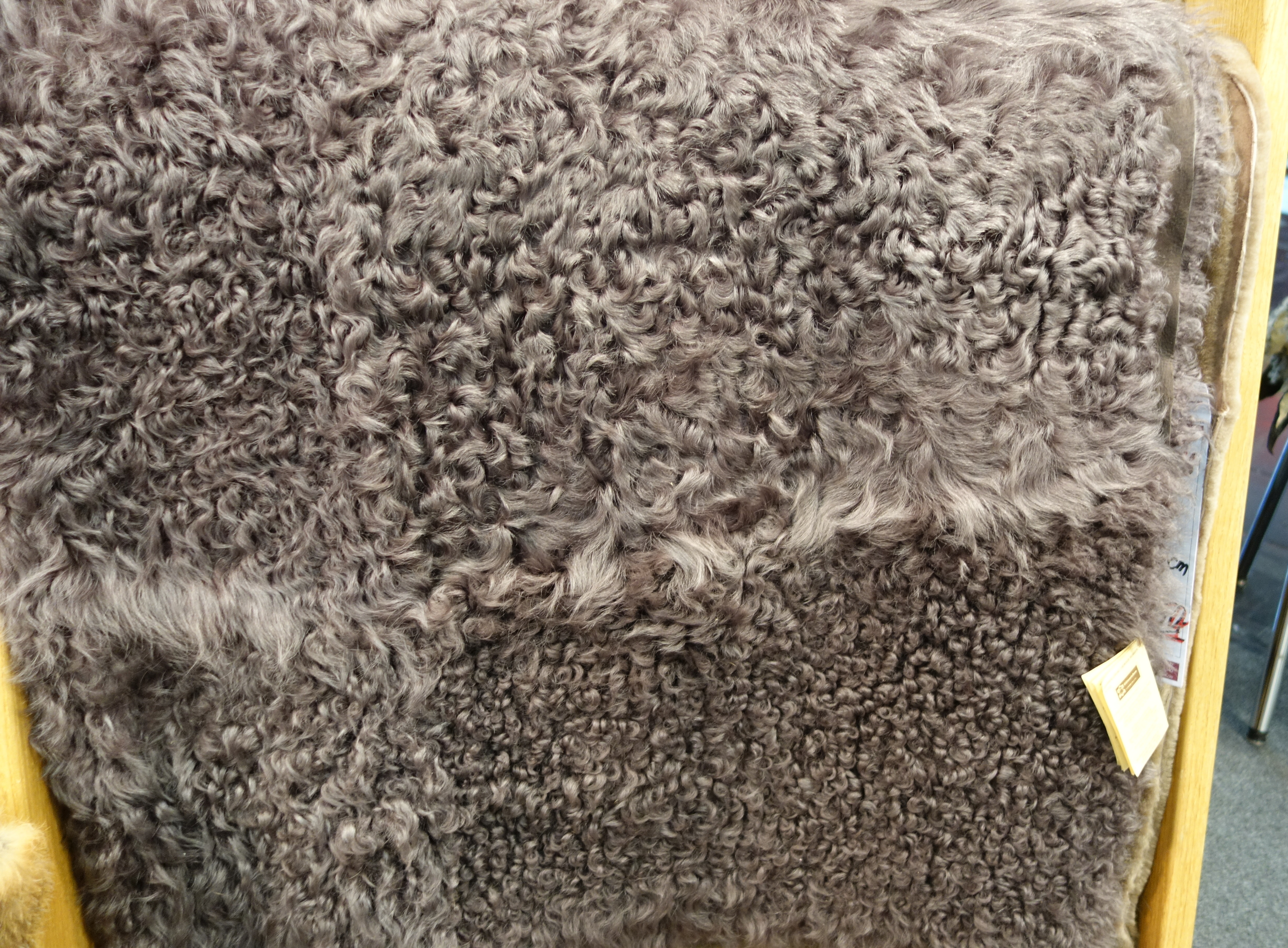 Taupe-gefärbte Tigrados-Lammtafel (spanische Lammfellart), doubleface, Größe 140 x 200 cm. Gesehen am Messestand der Firma Leonhard Hofstetter, Rötz. Messe „Jagd & Hund“ 2020, Dortmund, Westfalenhalle.